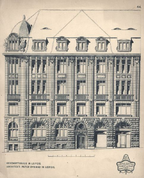 Architekturzeichnung von Peter Dybwad zum Haus Thomaskirchhof 20 in Leipzig